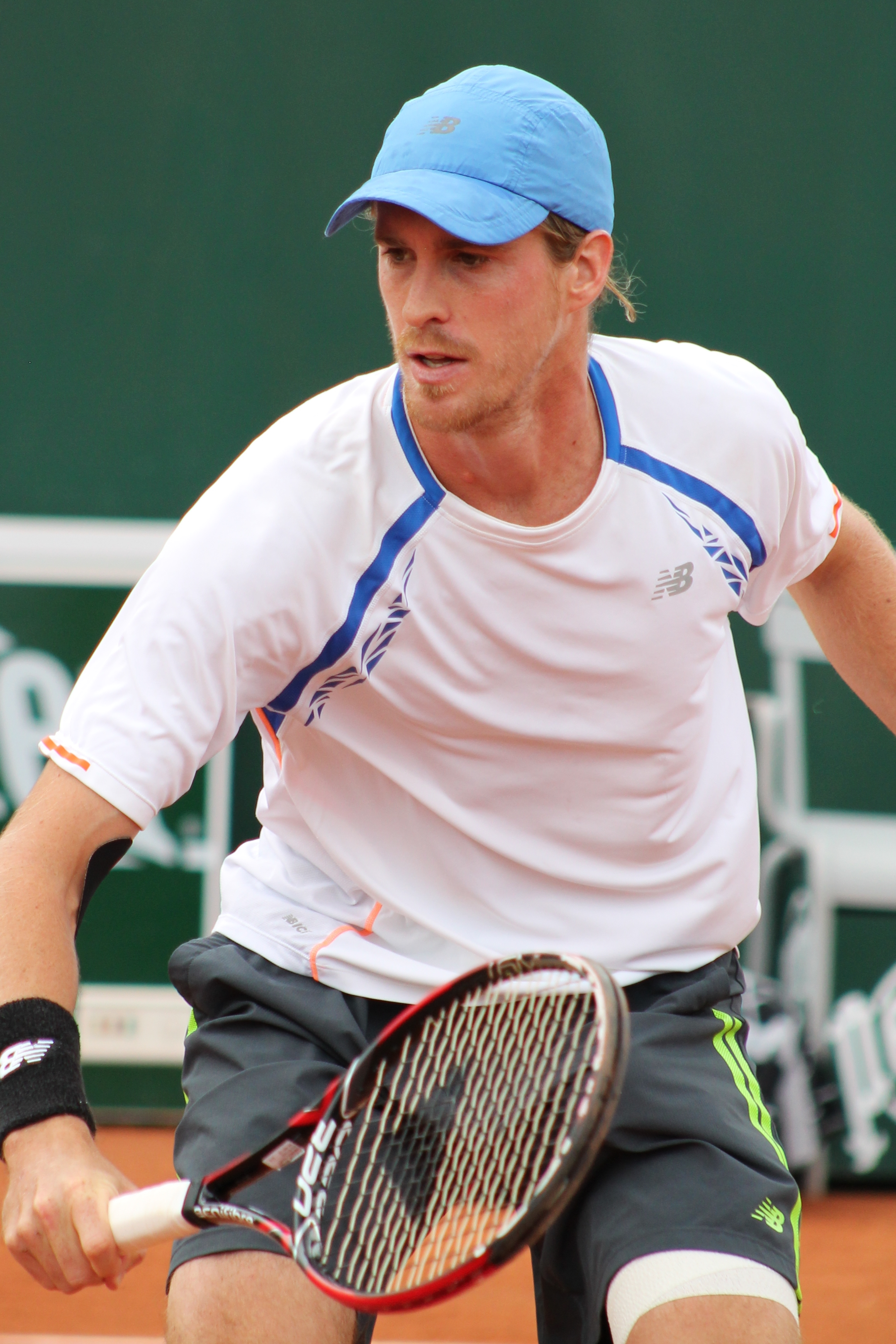 Daniell RG15 (12)